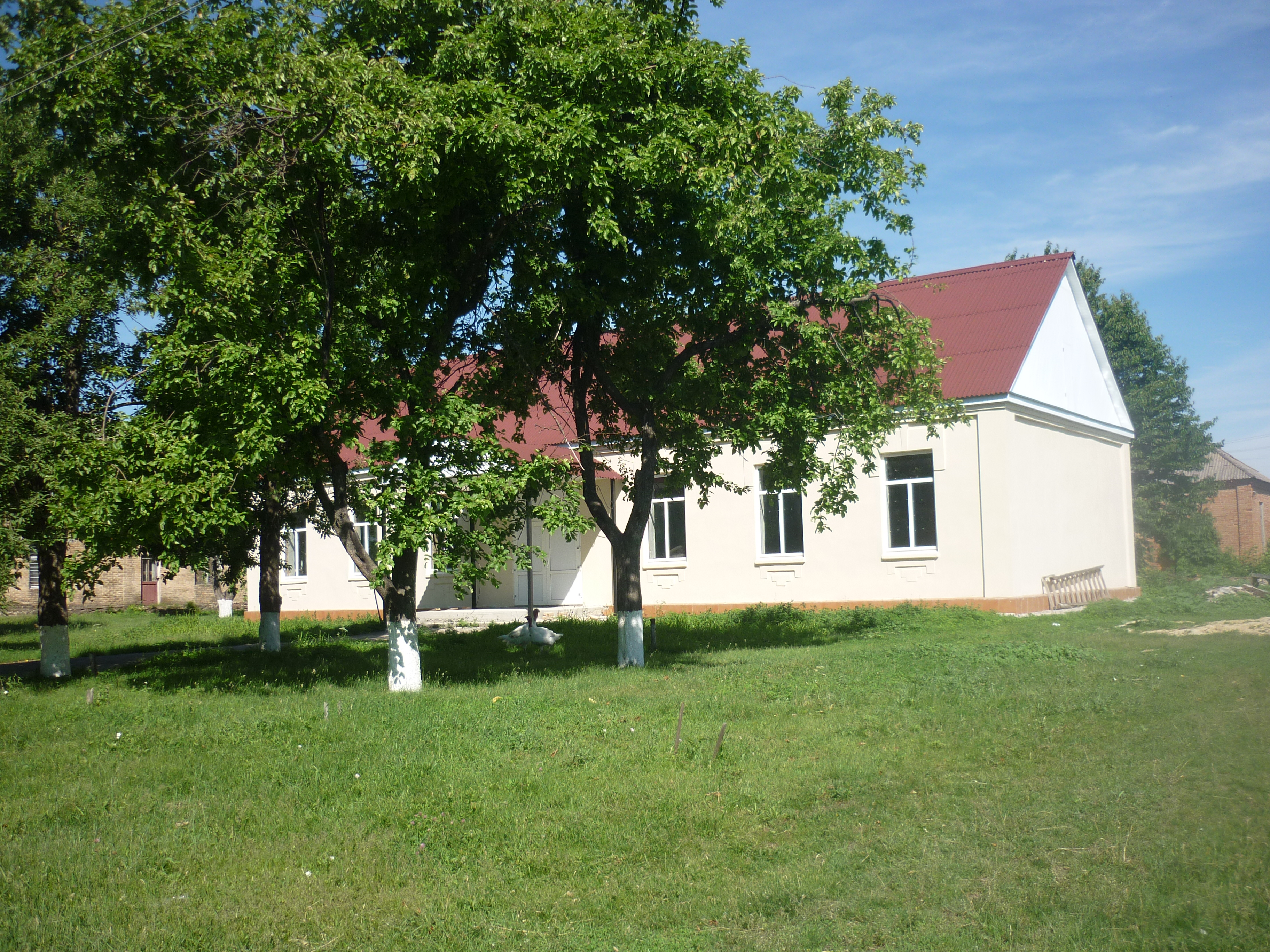 Сільський клуб у селі Головківка Чигиринського району